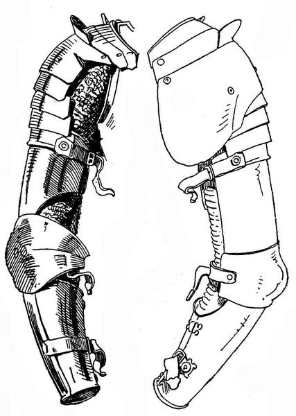 Halbe Kacheln an einem Armzeug, vorder- und Rückseite